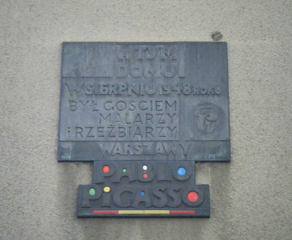 Tablica upamiętniająca wizytę Pabla Picassa. Warszawa, Saska Kępa, ul. Obrońców 28/30. Tablica wykonana została przez Stanisława Sikorę.